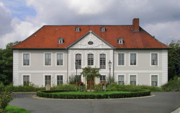 Schliestedter Schloss im Sommer